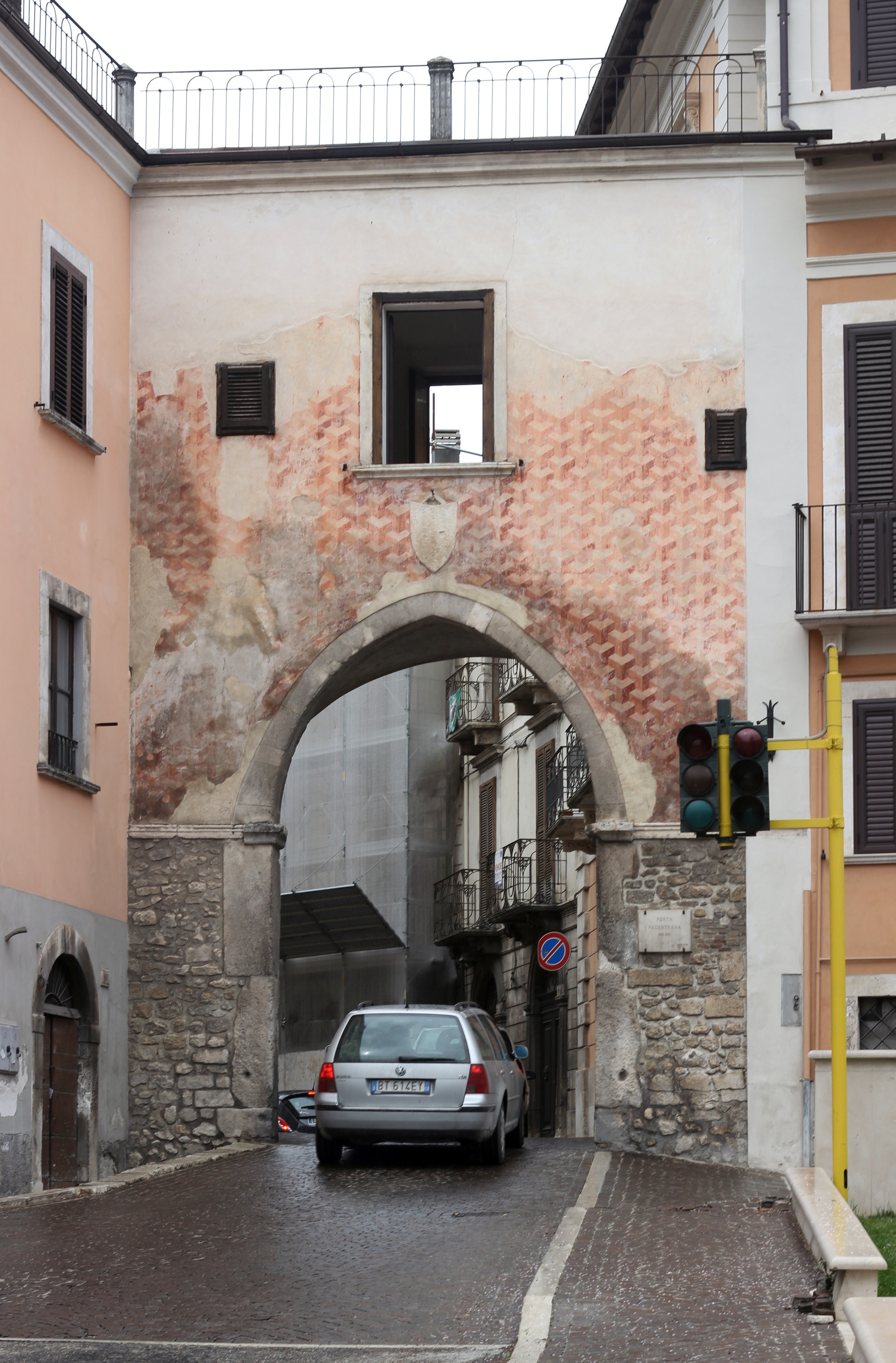 Porta Pacentrana - Porta Orientis in Sulmona